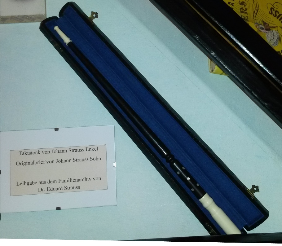 Taktstock von Johann Strauss Enkel, Privatbesitz Familie Strauss.